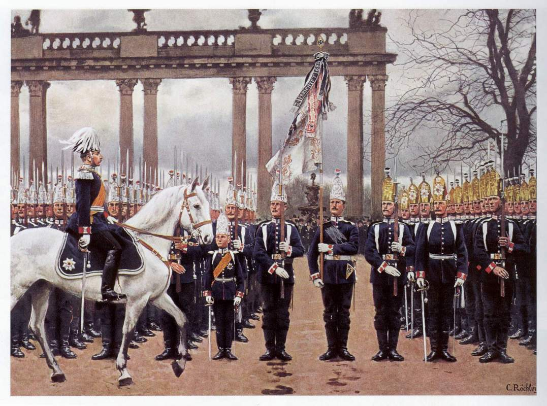 „Parade im Lustgarten 9.2.1894“ (Potsdam). Gemälde mit dem preußischen "1. Garderegiment zu Fuß"